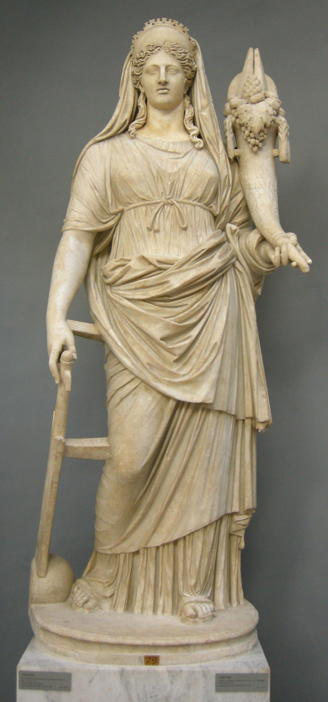 Fortuna, rielaborazione romana da originale greco del IV secolo ac. con testa non pertinente, da tor bovicciana (ostia), inv. 2244